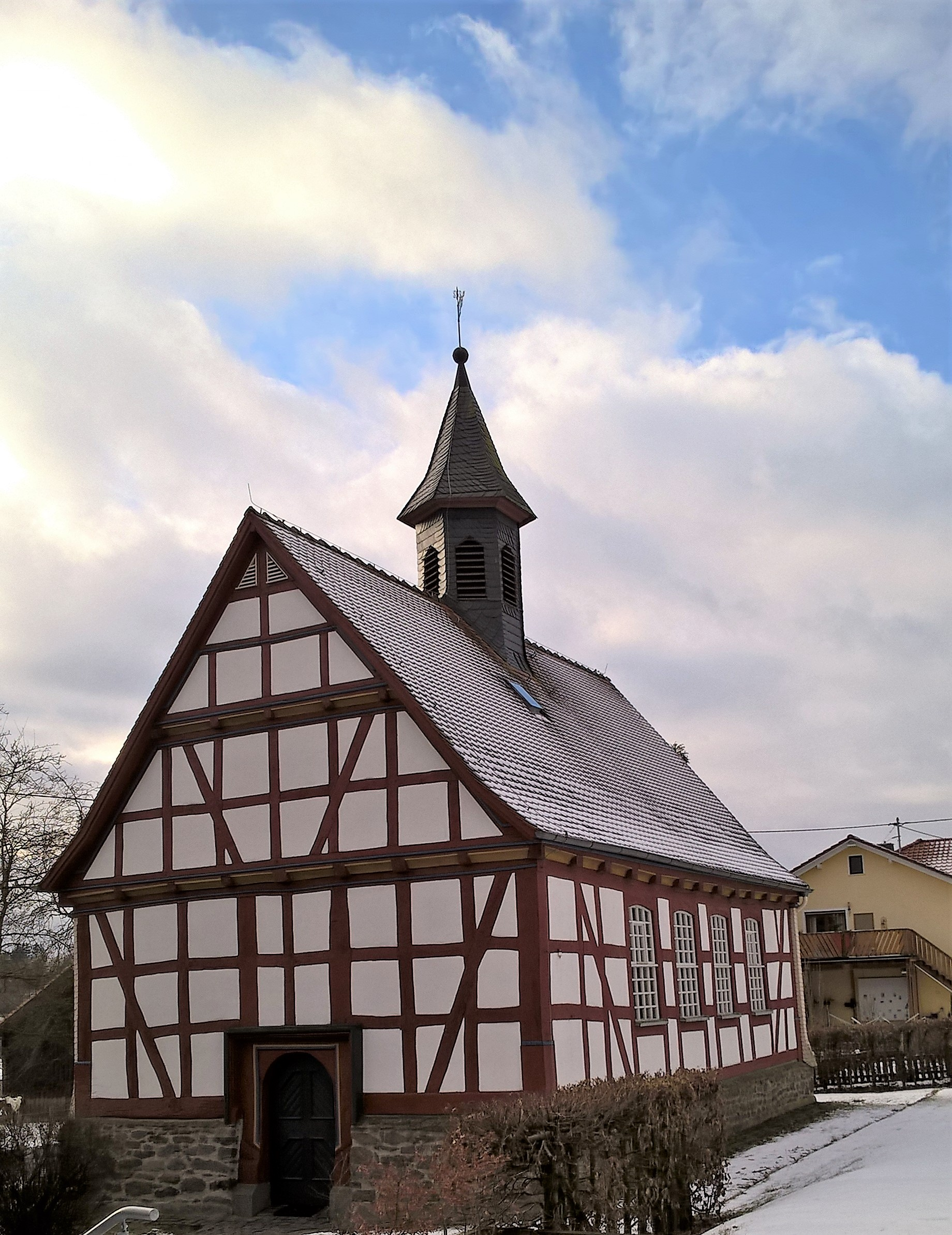 Evangelische Kirche Ilsdorf (ursprünglich Bernsfeld), Gemeinde Mücke, Vogelsbergkreis, Hessen, Deutschland